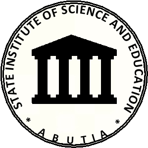 State Institute of Science and Education (Abutia)